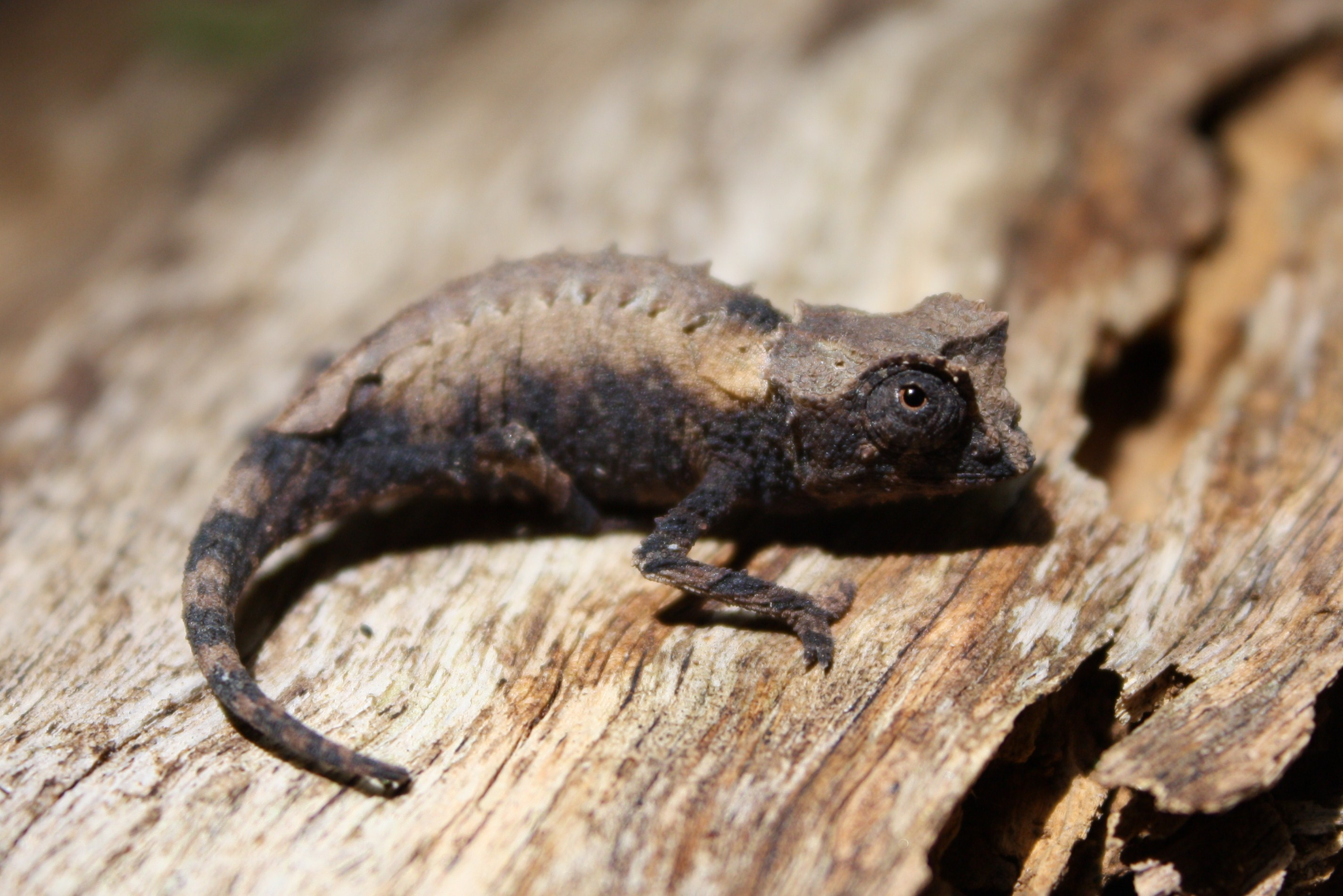 Brookesia stumpffi, Ankarana, N Madagascar